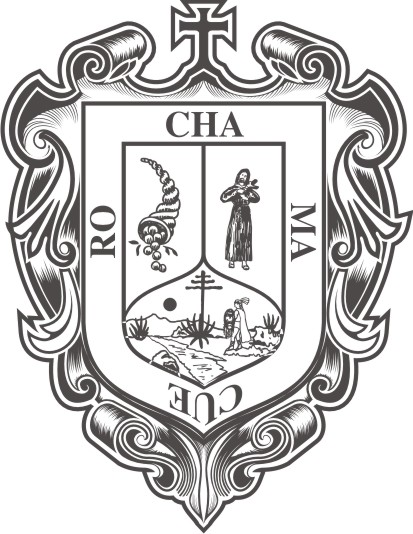 Escudo del Municipio de Comonfort, Guanajuato, Mexico en Blanco y Negro